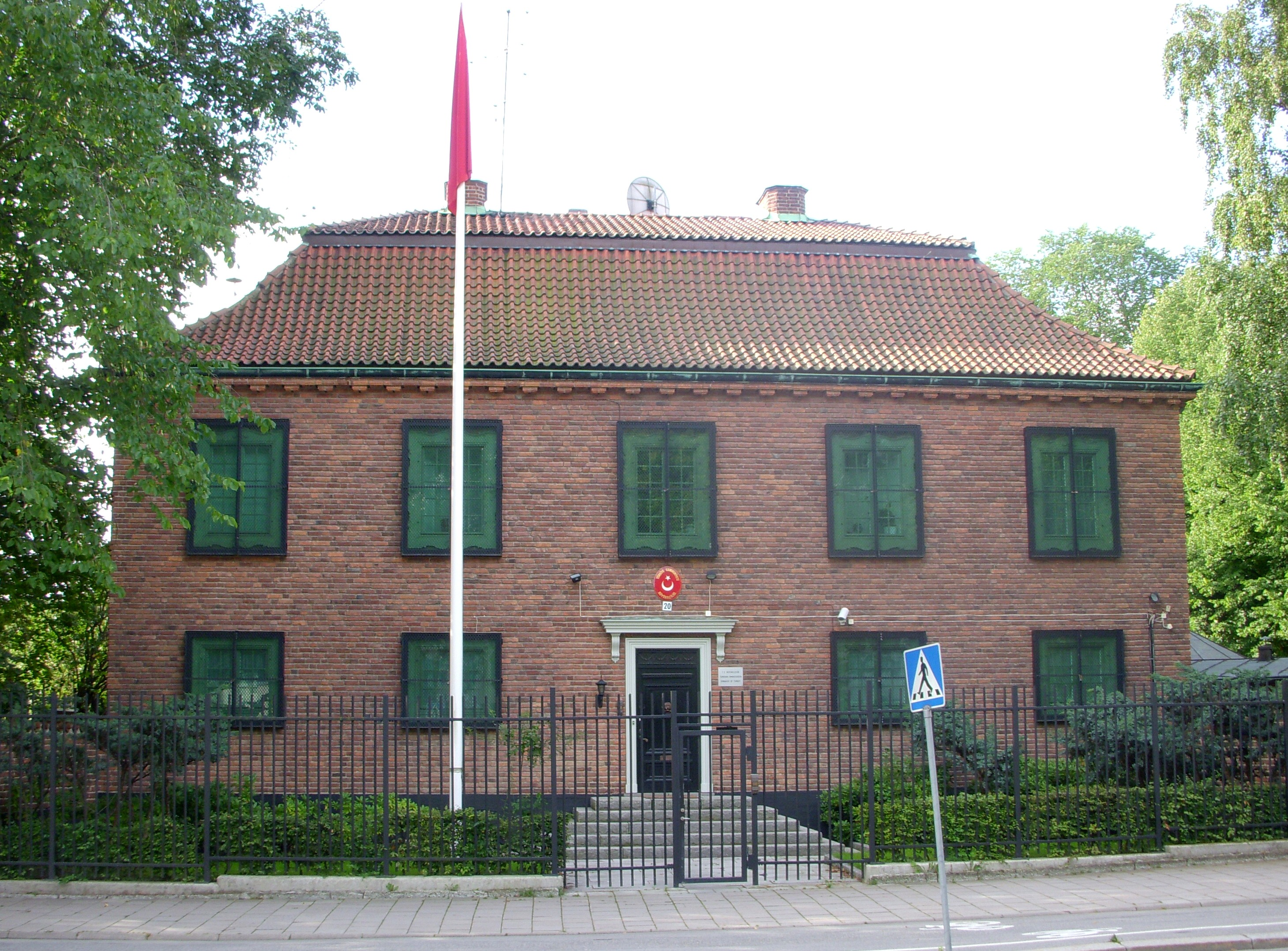 Diplomatstaden i Stockholm, Kv. Ambassadören nr. 7